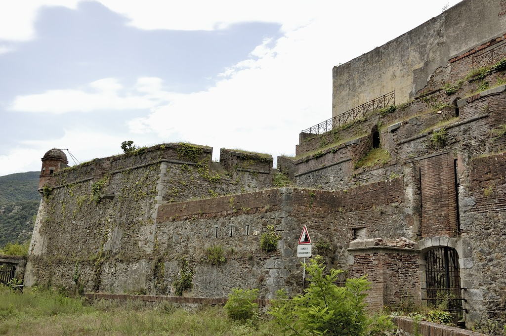 Fort les Bains, Amélie-les-Bains-Palalda (Pyrénées-Orientales, Languedoc-Roussillon, France)